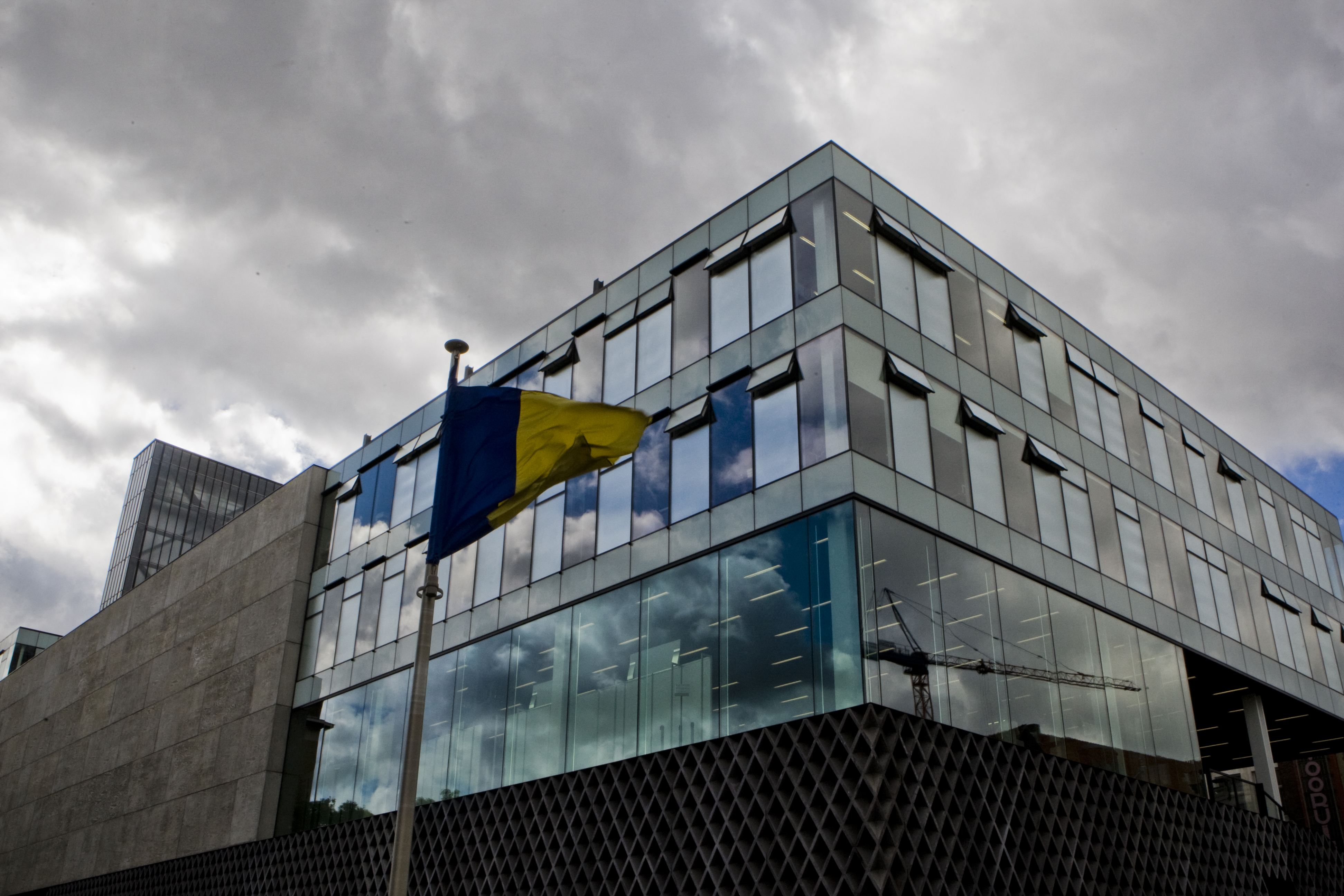 Foto van het Universiteitsforum van de Universiteit Gent. Foto gedoneerd door UGentMemorie. Fotografie Pieter Morlion